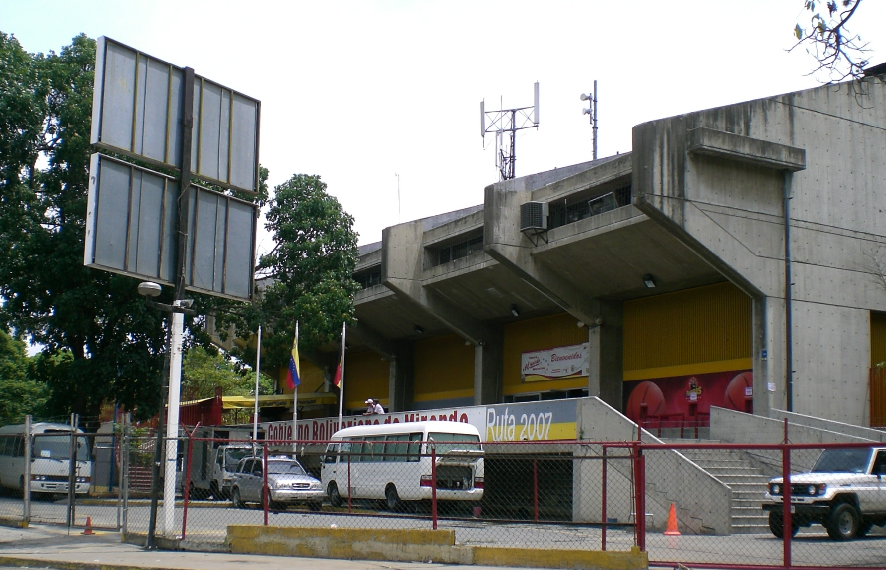 Parque Miranda Sports Complex, Caracas, Venezuela